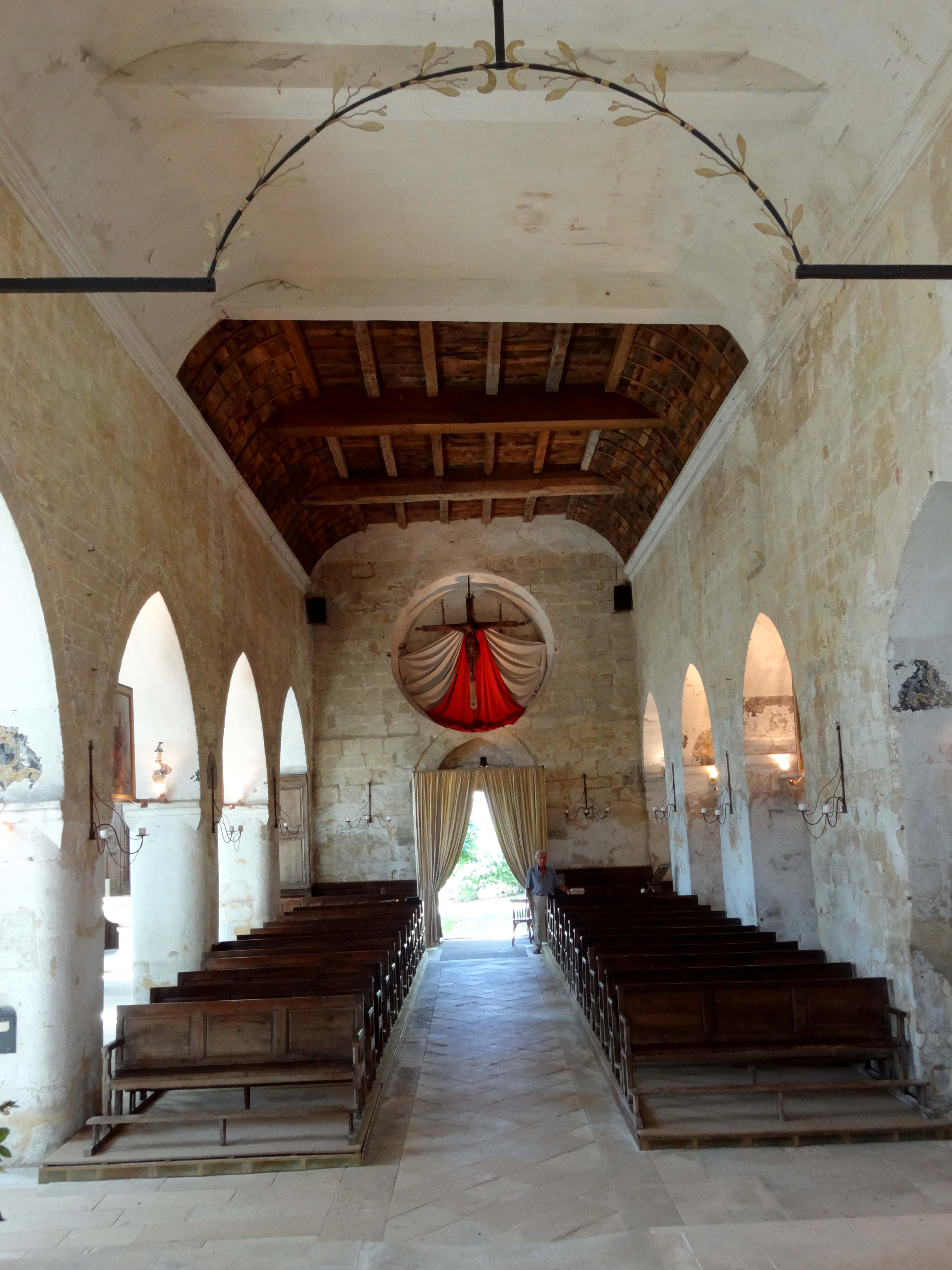 Intérieur de l'église - voir titre.